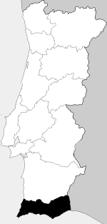 Algarve (provincia) Former province of Algarve, Portugal Created by User:Brian Boru in September 2005, based on a map created by Jorge Candeias.